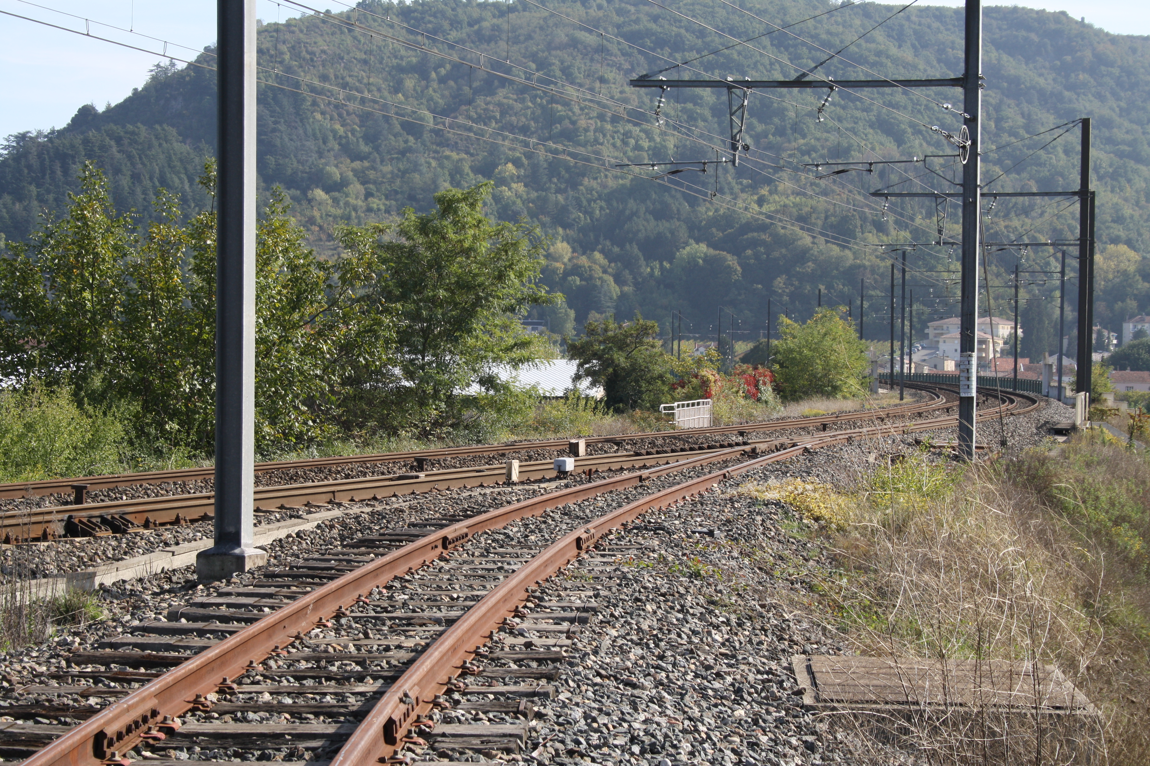 Mündung der Schmalspurstrecke in das Dreischienengleis bei St. Jean-de-Muzols